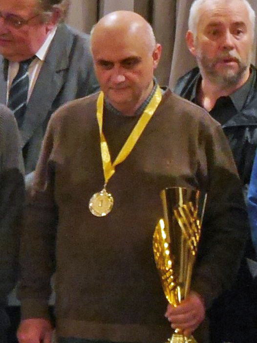 Giorgi Bagaturov, Schachweltmeisterschaft der Senioren 2016 in Marienbad.